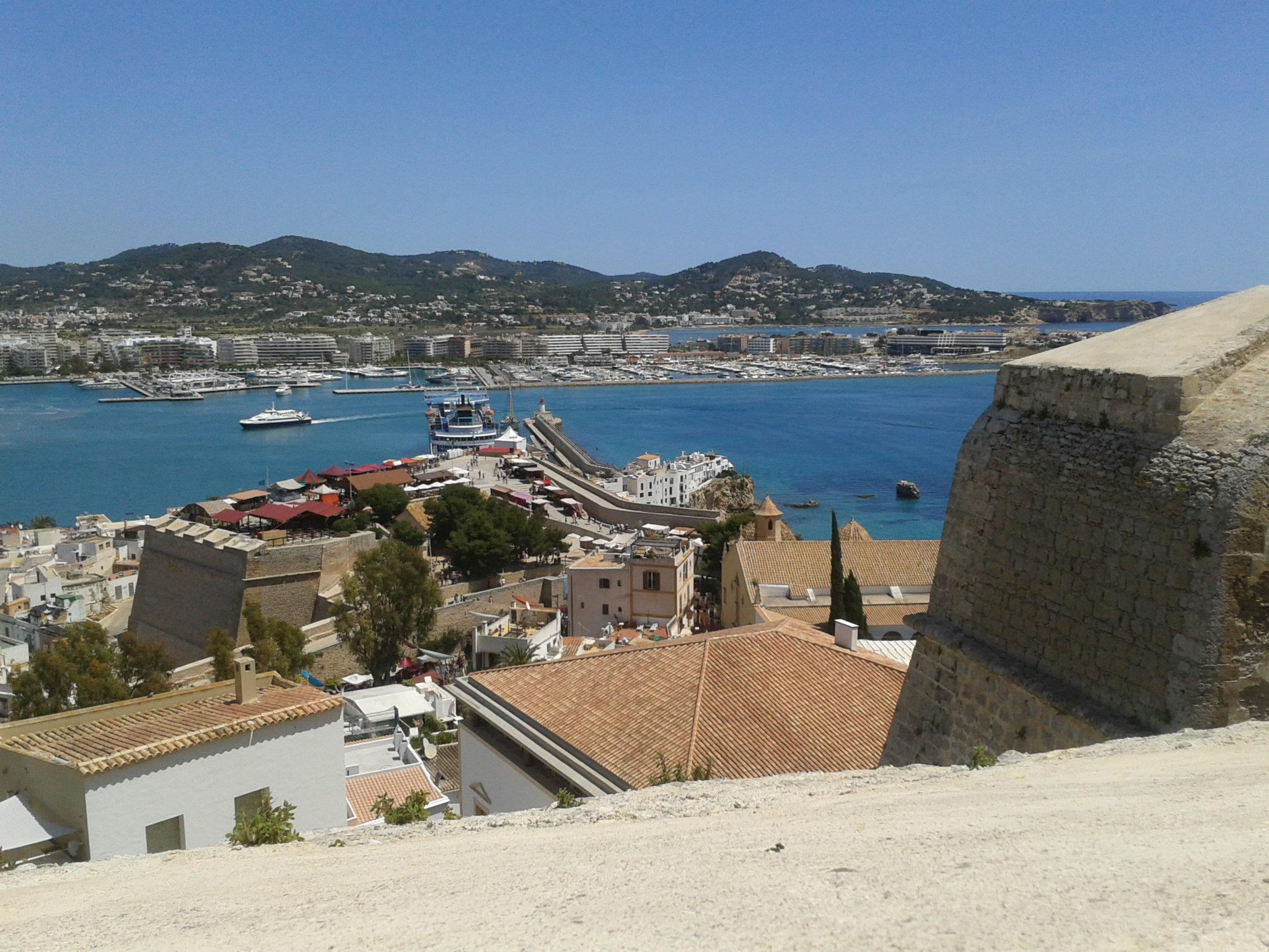 Vistes desde Dalt Vila (Eivissa)